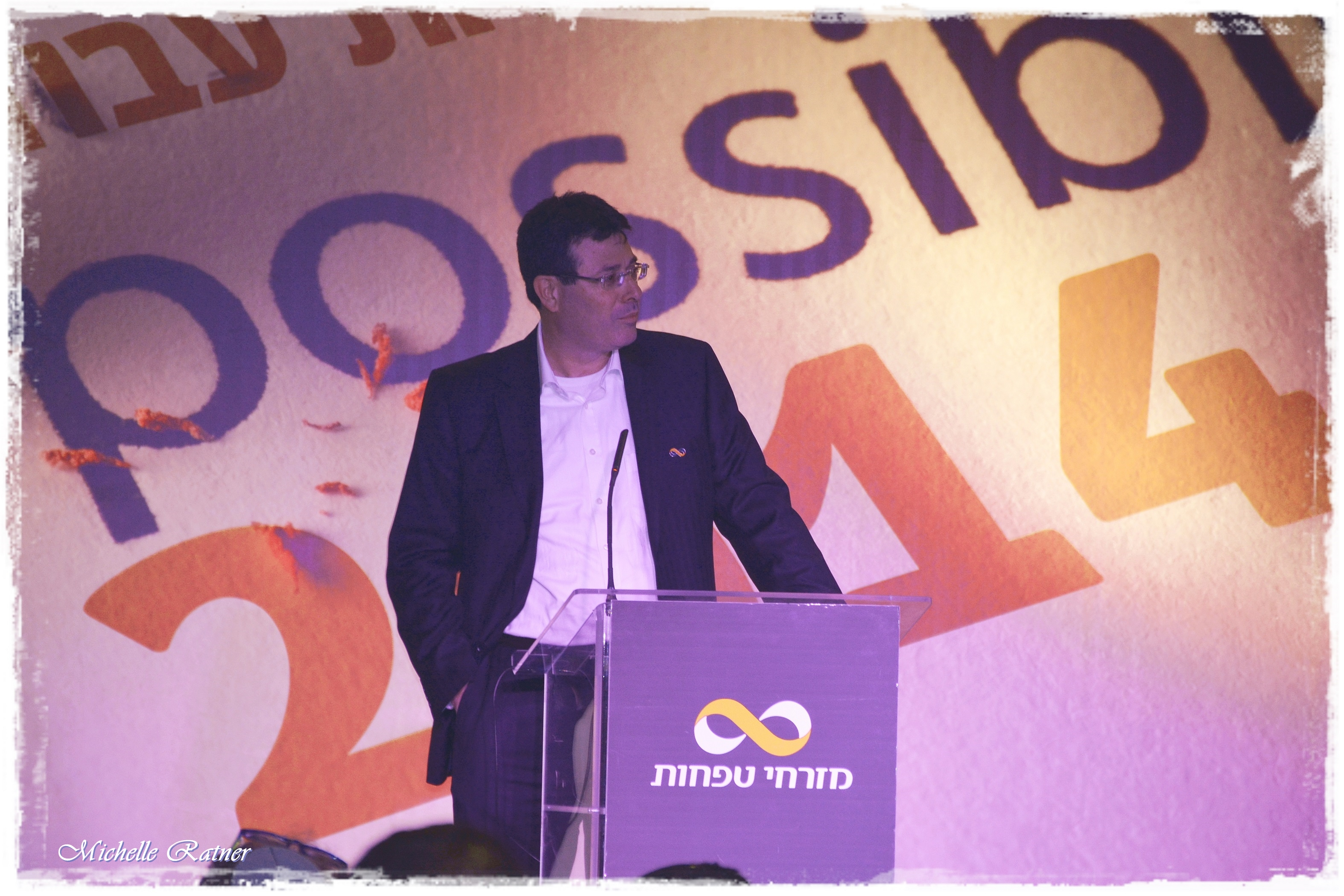 כנס תוכנית עבודה 1.2014